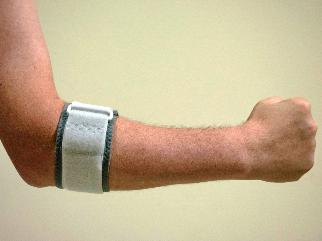 اصابة لاعب التنس - جبيرة القوة المعاكسة Tennis Elbow - Counterforce brace.